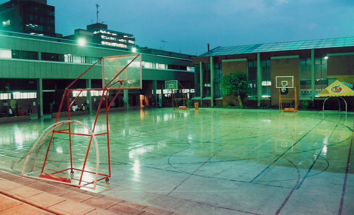 Canchas UPN